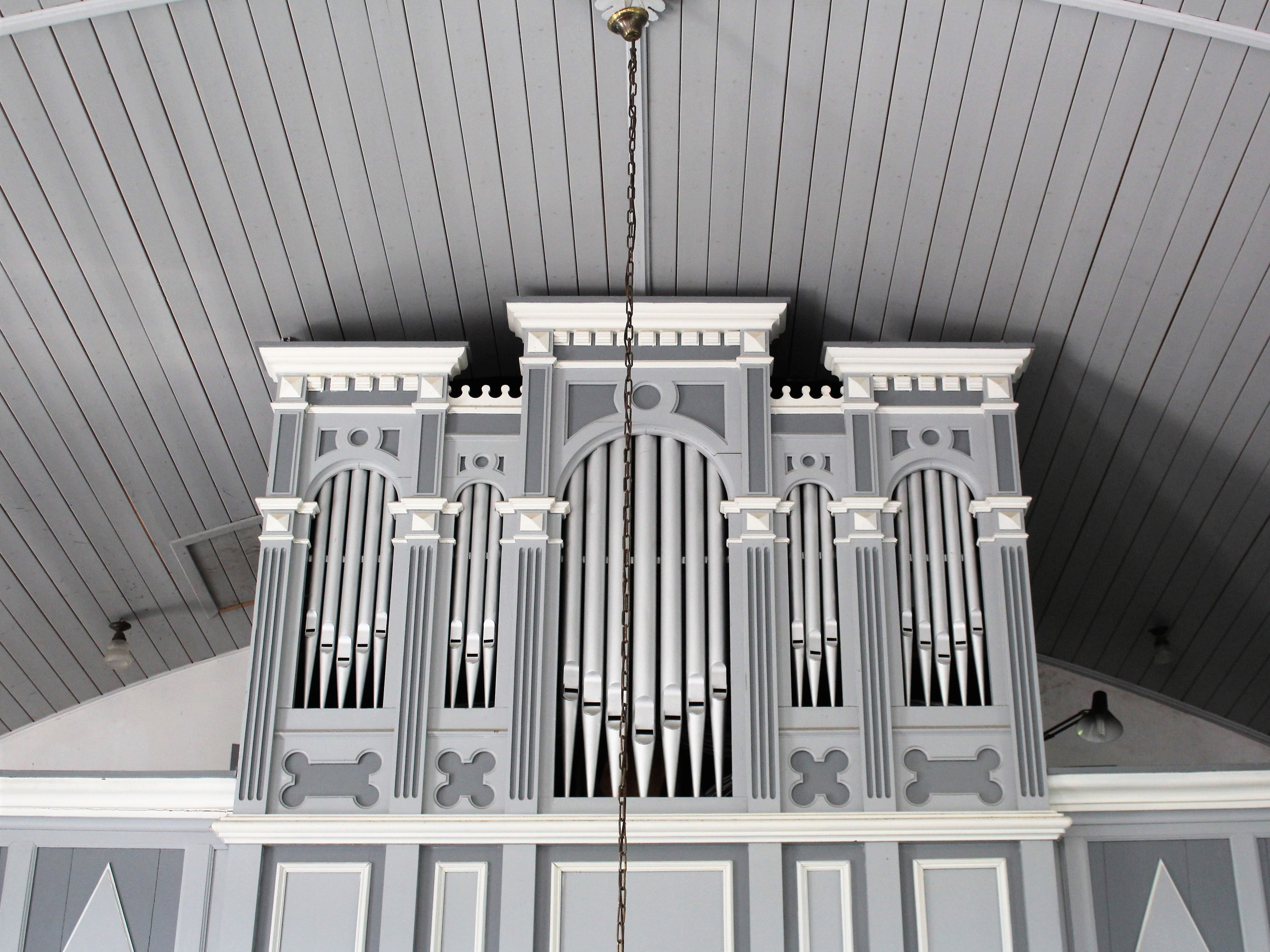 Ev.-reformierte Kirche Weenermoor, Landkreis Leer, Ostfriesland, Deutschland